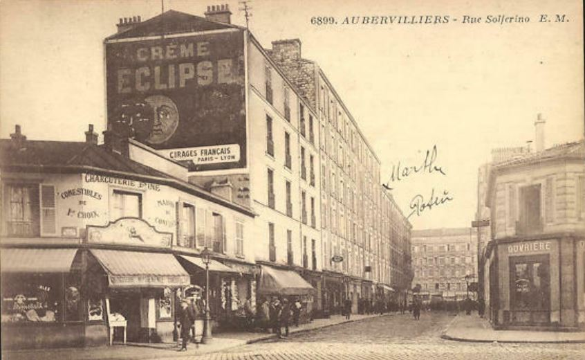 Aubervilliers.Rue Solférino.Publicité